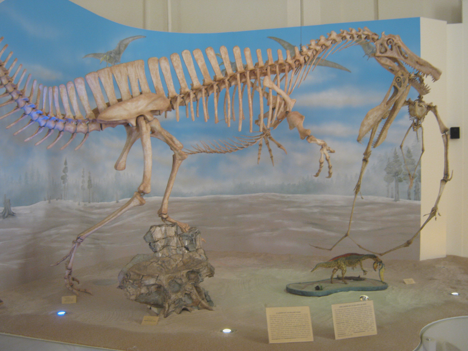 Exposição no Museu Nacional.